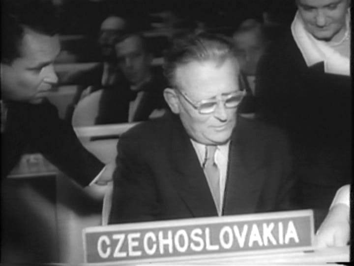 Prezident Novotný na zasedání OSN, kde Ike Eisenhower pronese projev o nutnosti odzbrojení. (Datum: 22. září 1960). Ike At U.N. Proposes New World Disarmament Program, 1960/09/22 (1960) Khrushchev, Castro, Novotny of Czech, Ike at UN meeting; Ike speaks (glitches) and describes 5-point programs